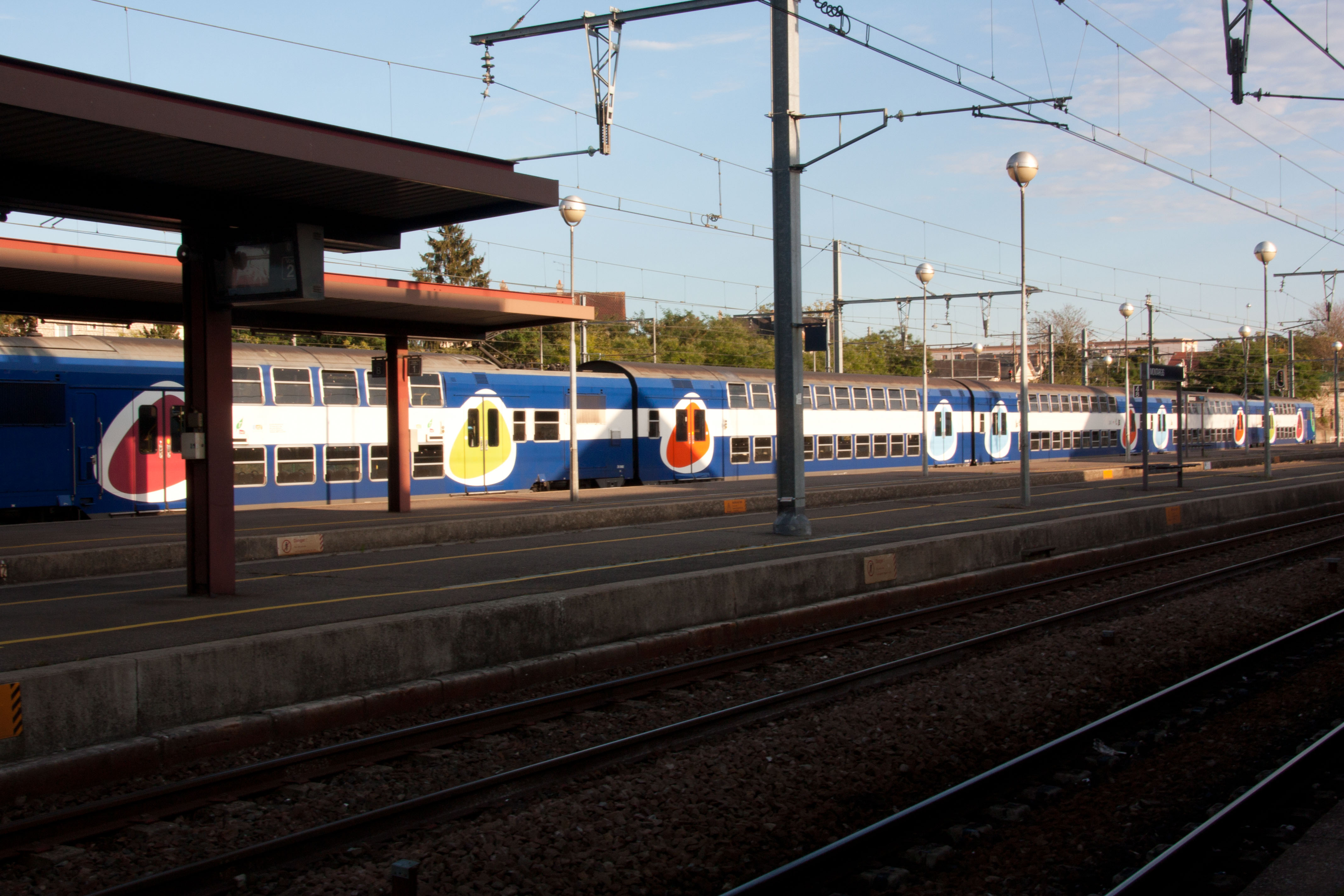 Gare de Montargis, Montargis, Loiret, France.